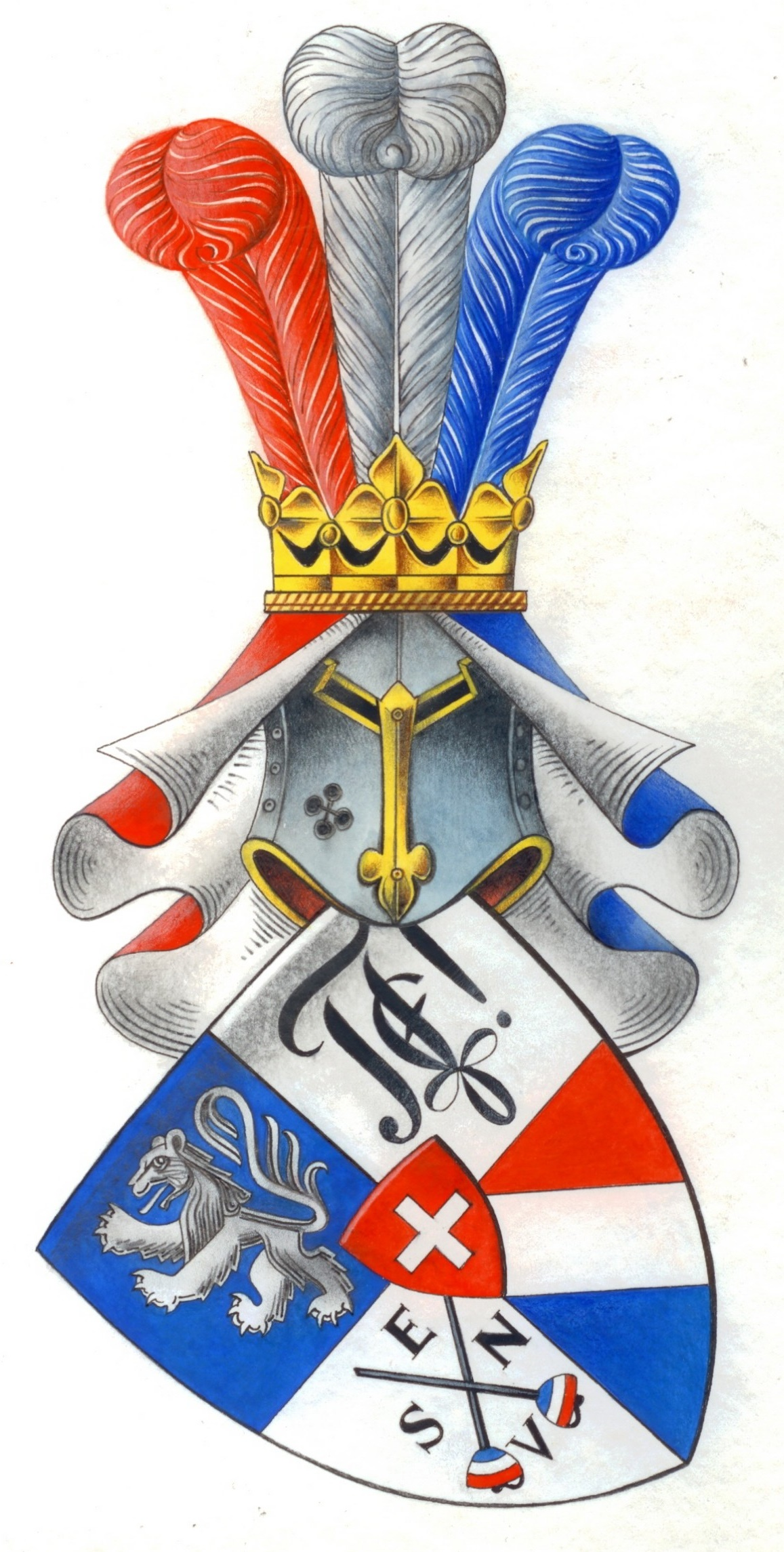 Studentenwappen des Corps Tigurinia Zürich